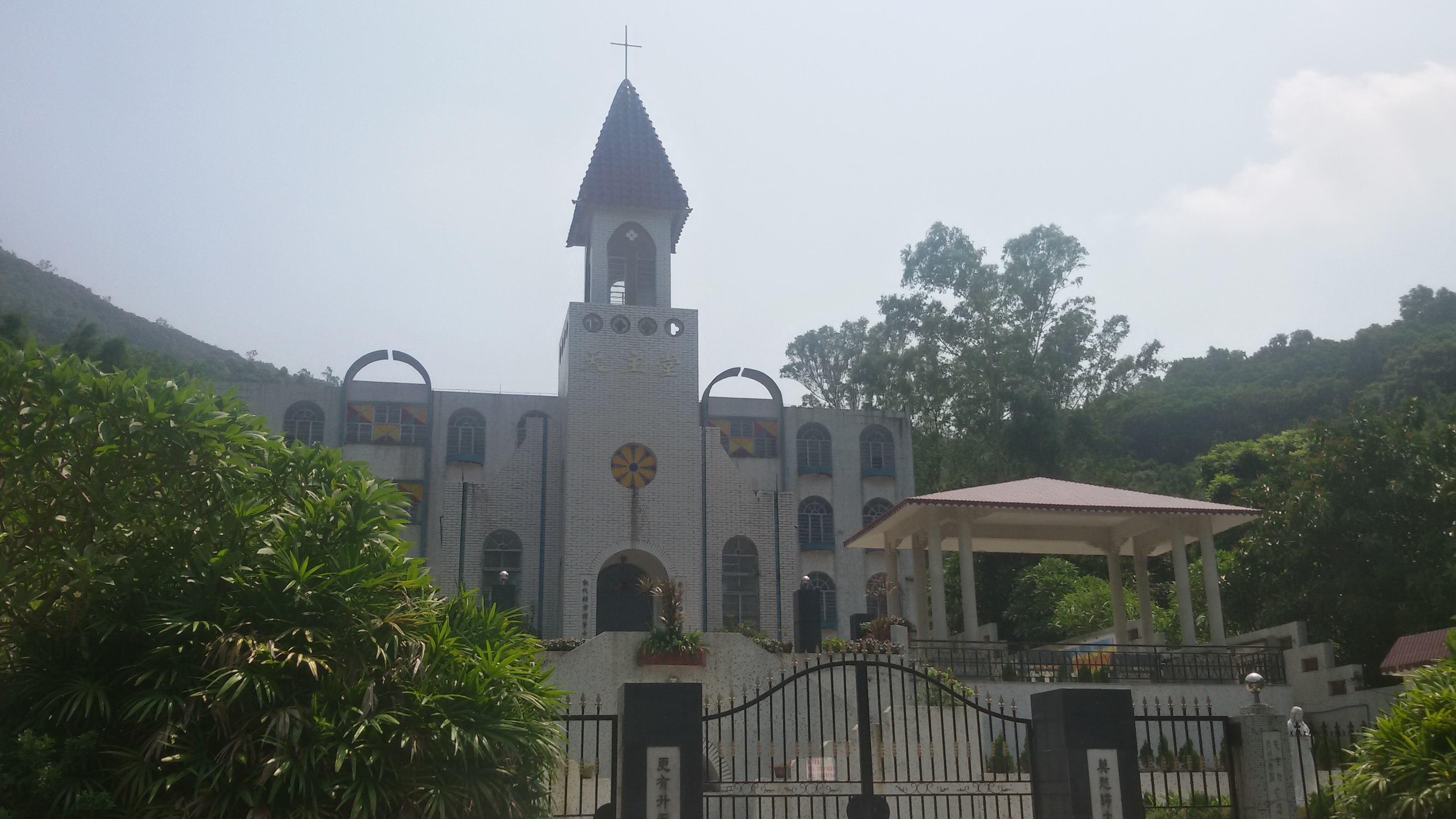 粵語: 天河區漁沙坦露濟亞堂